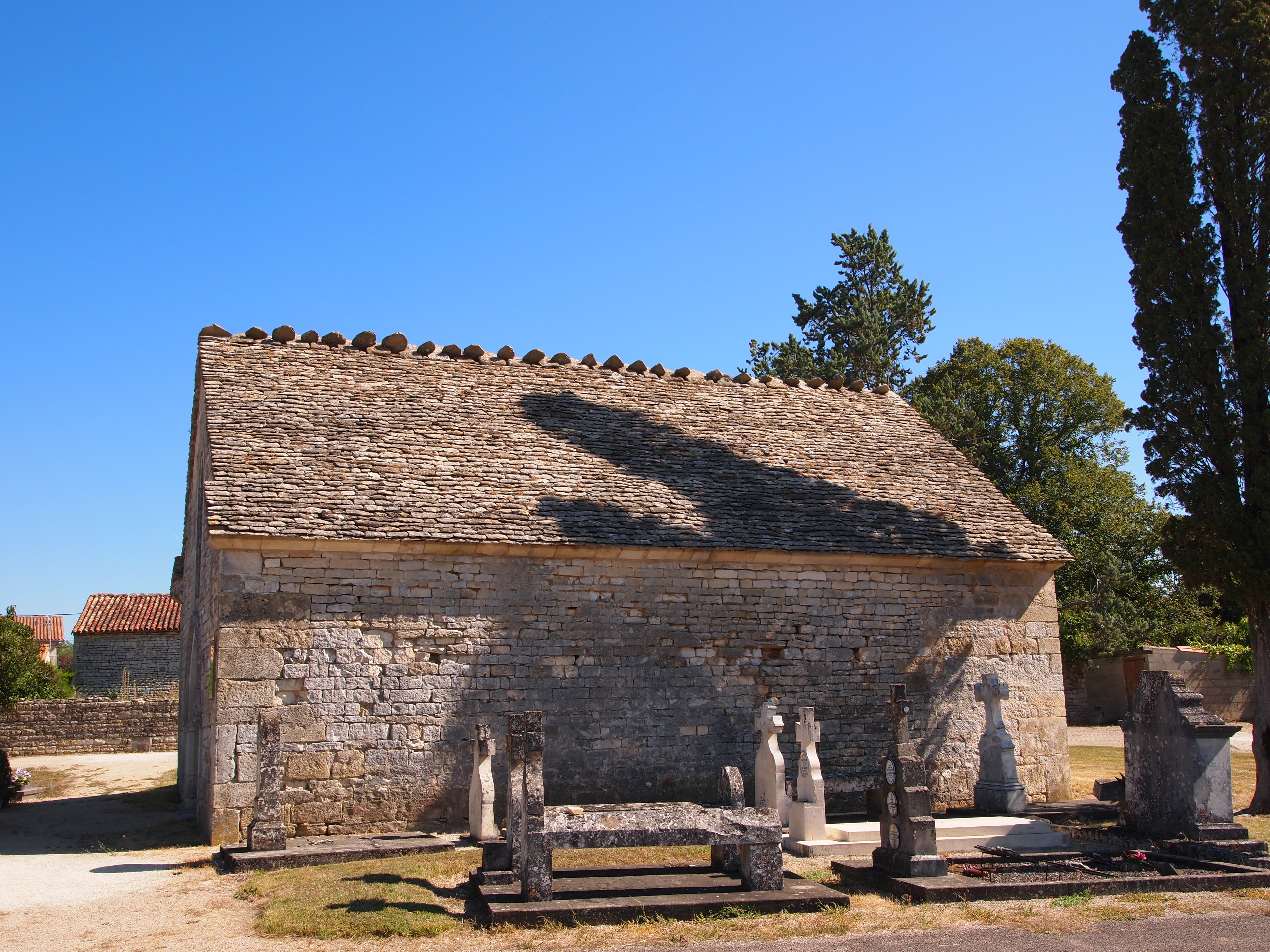 Chapelle du cimetière de Courcôme, en Charente (inscrit, 1979)